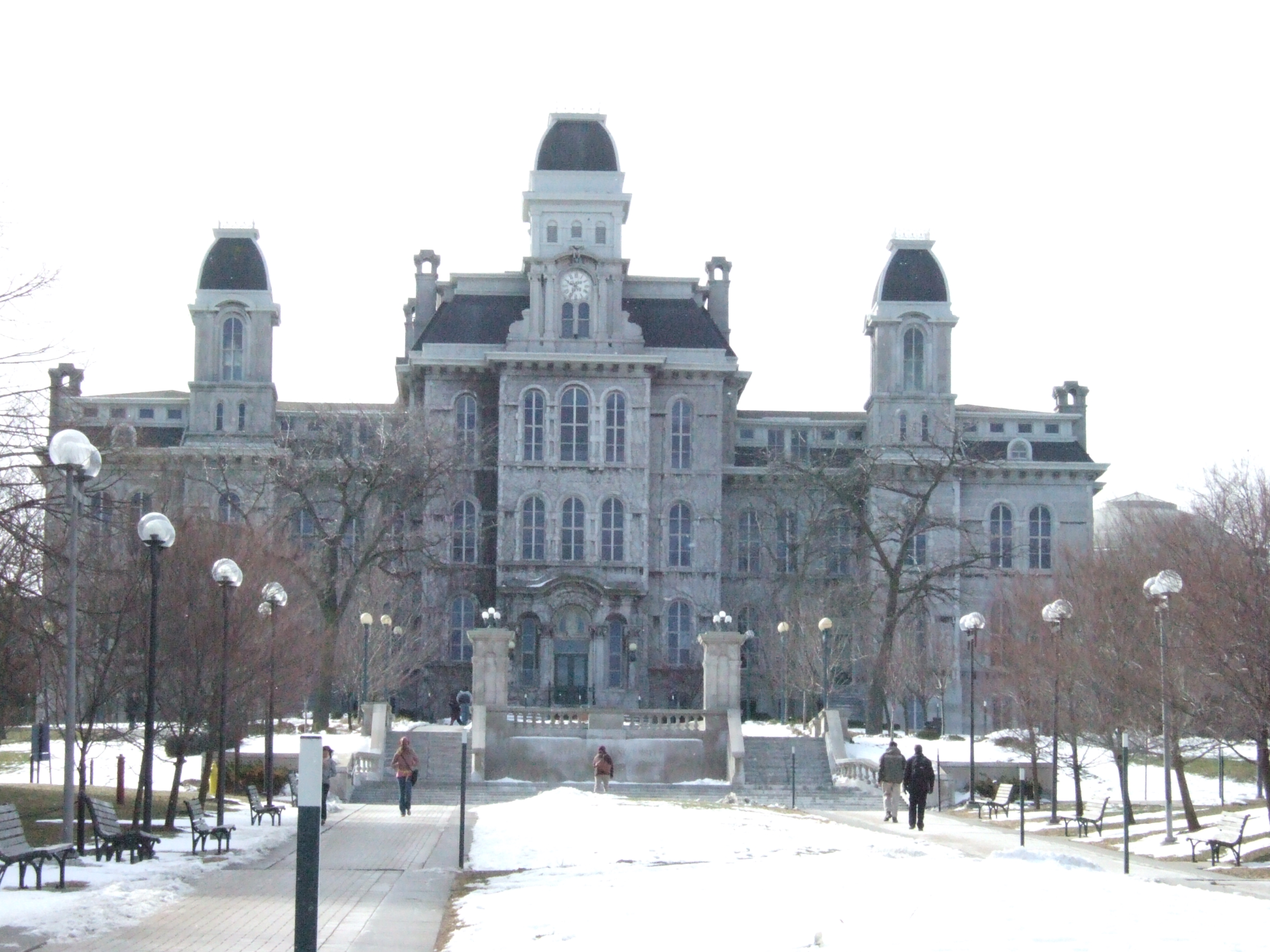 03/07/06 taken by Kisstory